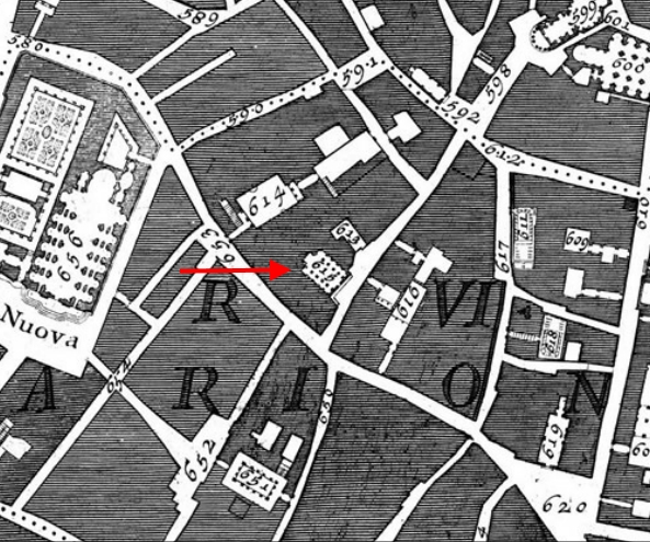 Pianta di Nolli